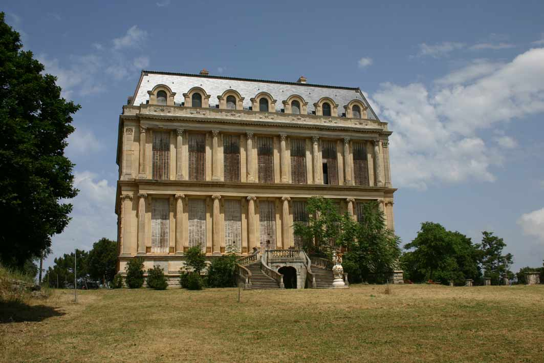 façade sud du château de la punta